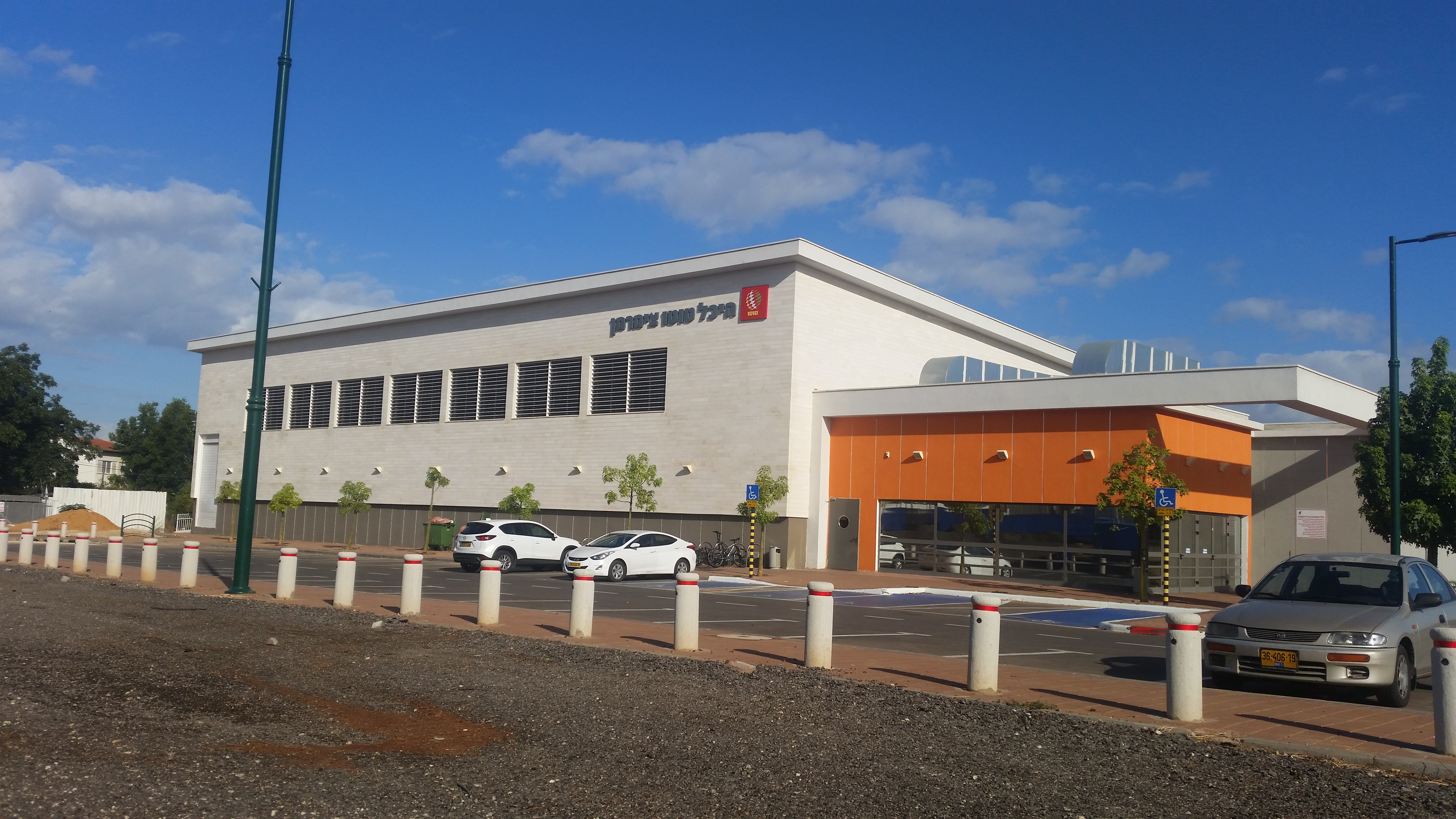 היכל הספורט "צימרמן החדש". בנס ציונה